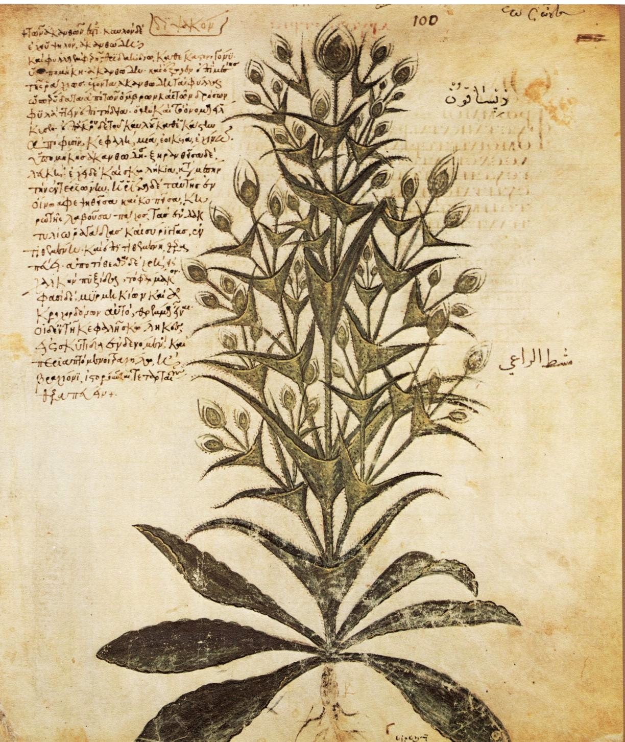 Pflanzenbild der Wilden Karde, (Dipsacus silvestris L., Fam. Compositae) aus dem Wiener Dioskurides (fol. 100 recto). Die Beschreibung und Synonyme des Namens befinden sich auf Blatt 99 verso. Der Text neben der Pflanze stammt aus dem Jahr 1406 und ist eine Umschrift der griechischen Bibelmajuskel in modernere Minuskel